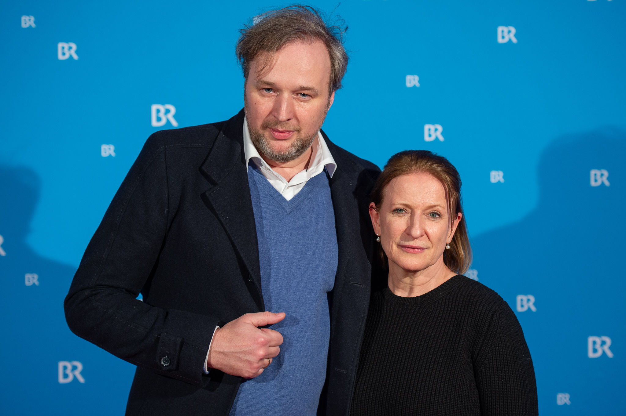 Bayerischer Rundfunk,Dagmar Manzel,Ein Tag wie jeder andere,Franken-Tatort,Preview,Stephan Grossmann,Tatort